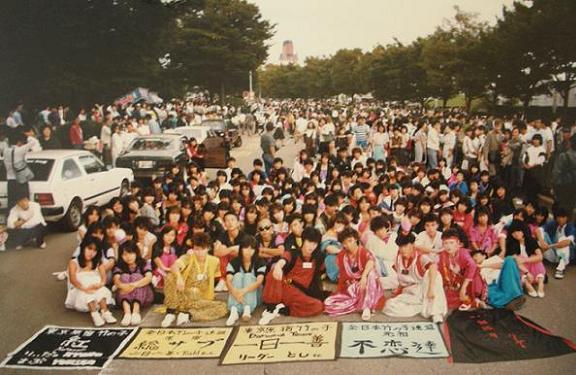 原宿竹の子族集合写真 不恋達（フレンズ）etc